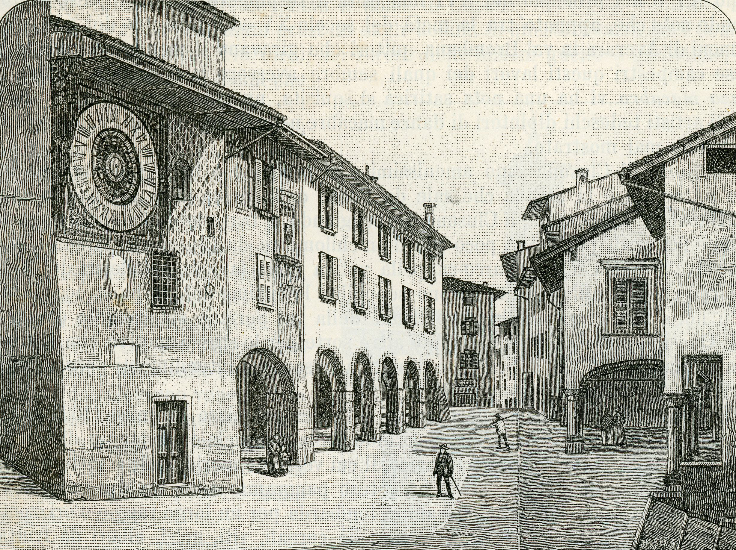 Clusone: palazzo municipale, (xilografia di Barberis).